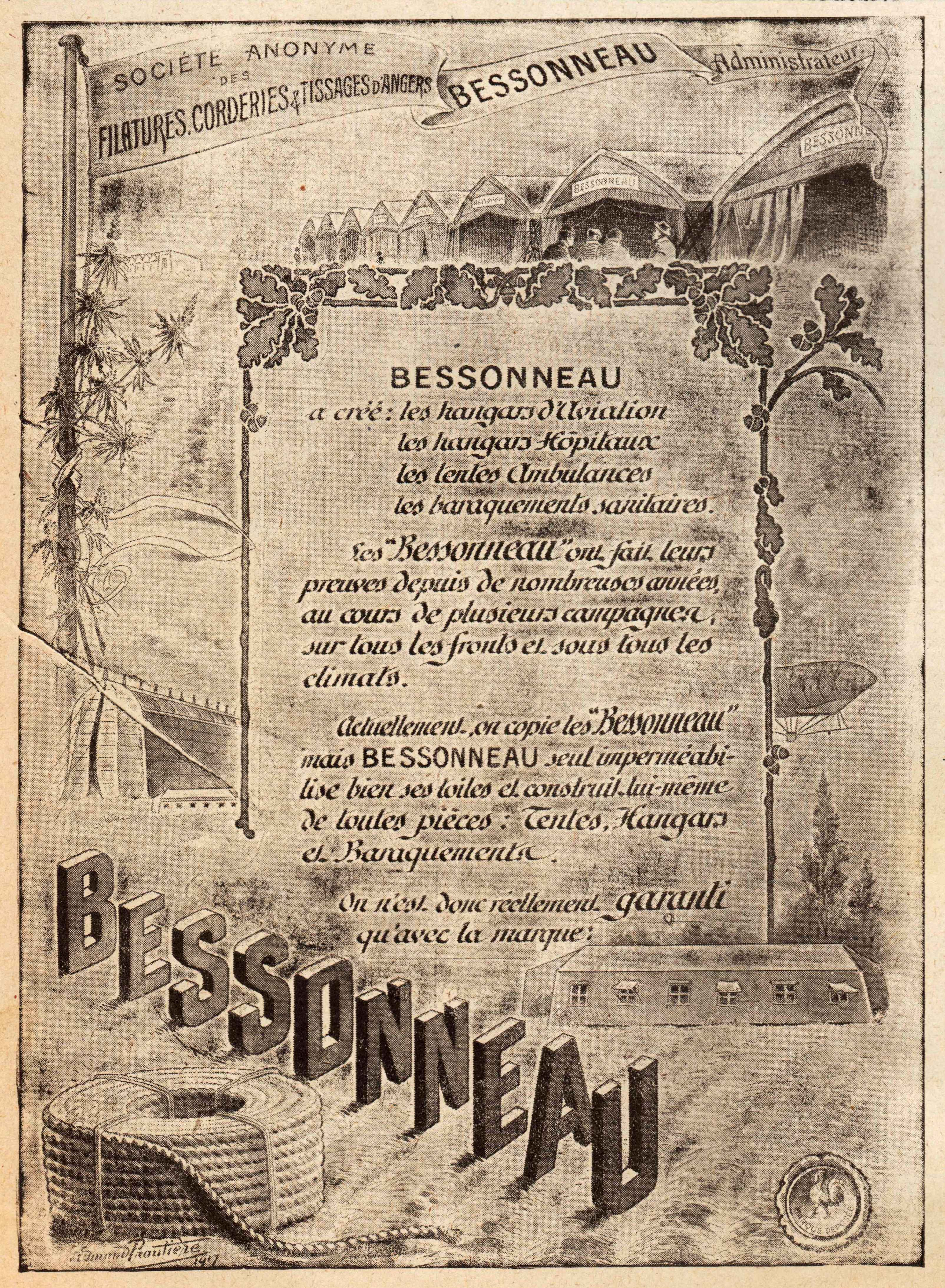 Publicité des Établissements Bessonneau. Extrait de L'Illustration du 9 février 1918.